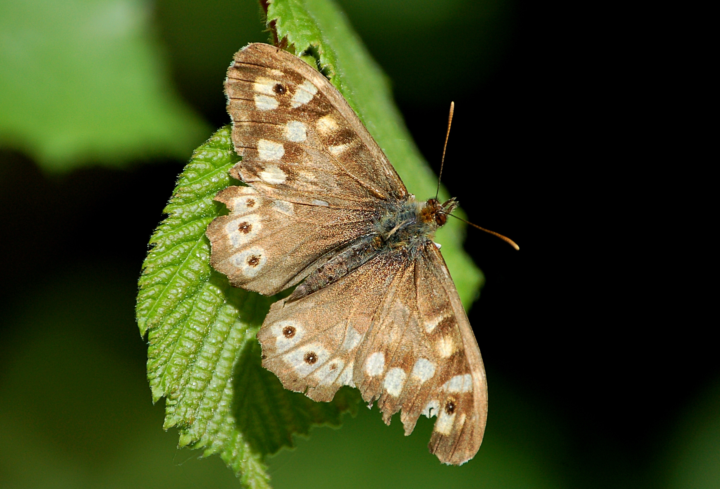 Un Tircis photographié dans un jardin en France